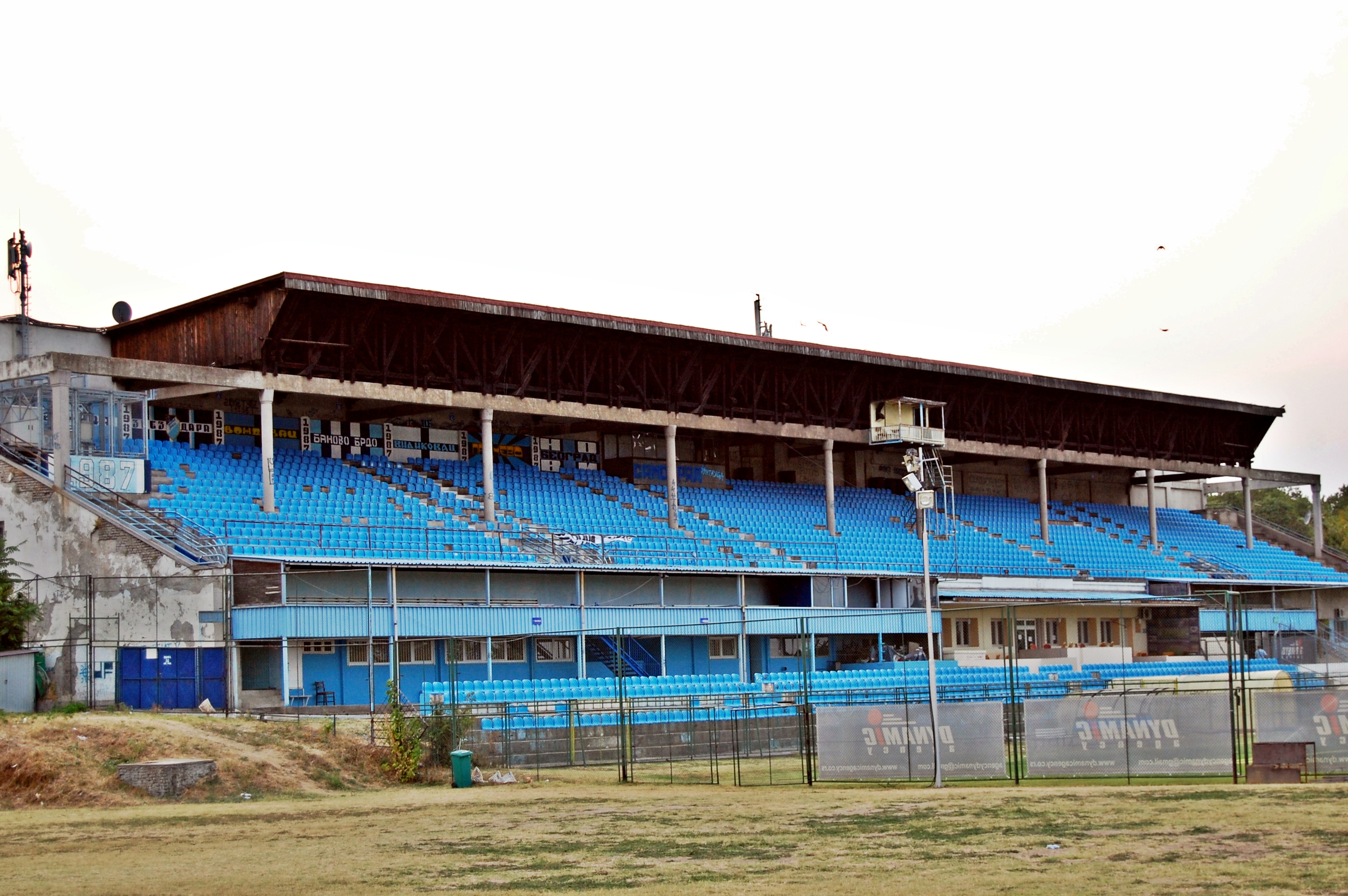 Stadio FK Rad